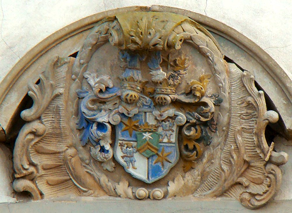 Wappen am Schloss in Bad Rappenau-Obergimpern